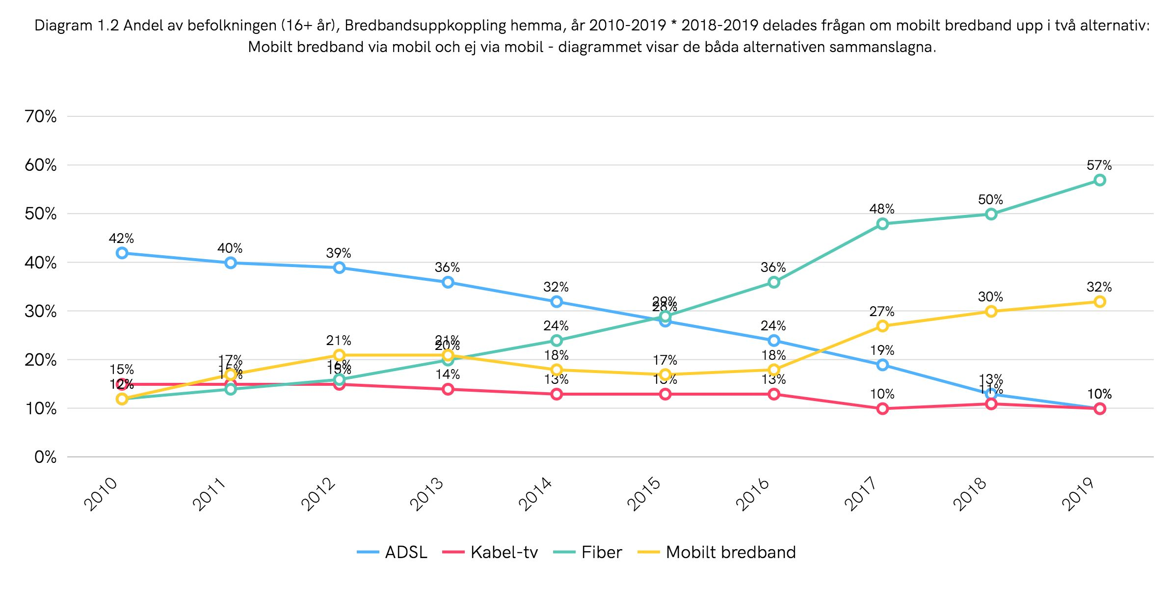 Andel av Sveriges befolkning (16+ år) som hade bredbandsuppkoppling hemma, år 2010–2019. Siffror från undersökningen "Svenskarna och internet".